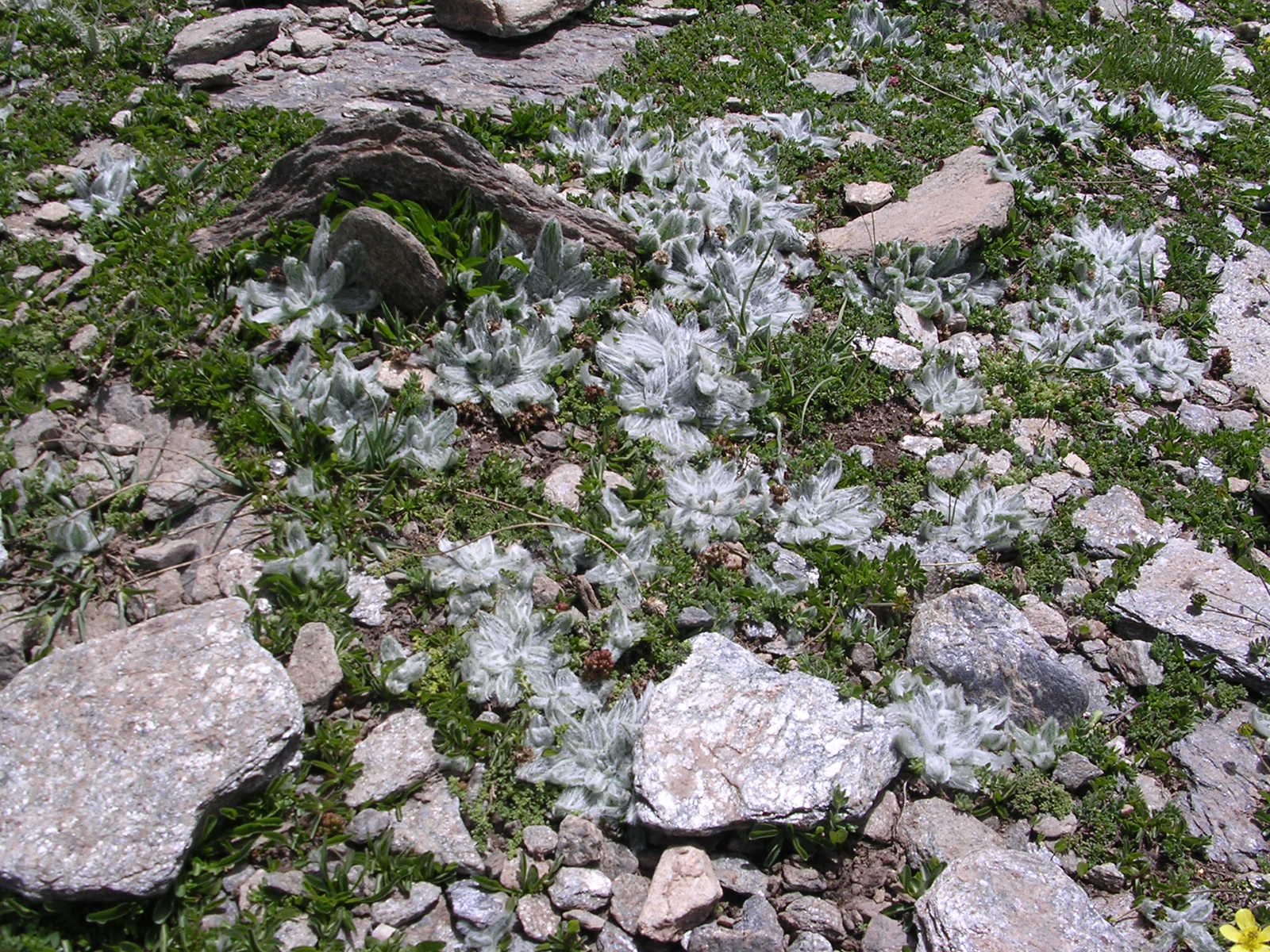 Numerosos Plantago nivalis tapizando un suelo nevadense. Afloran micaesquistos con granates.